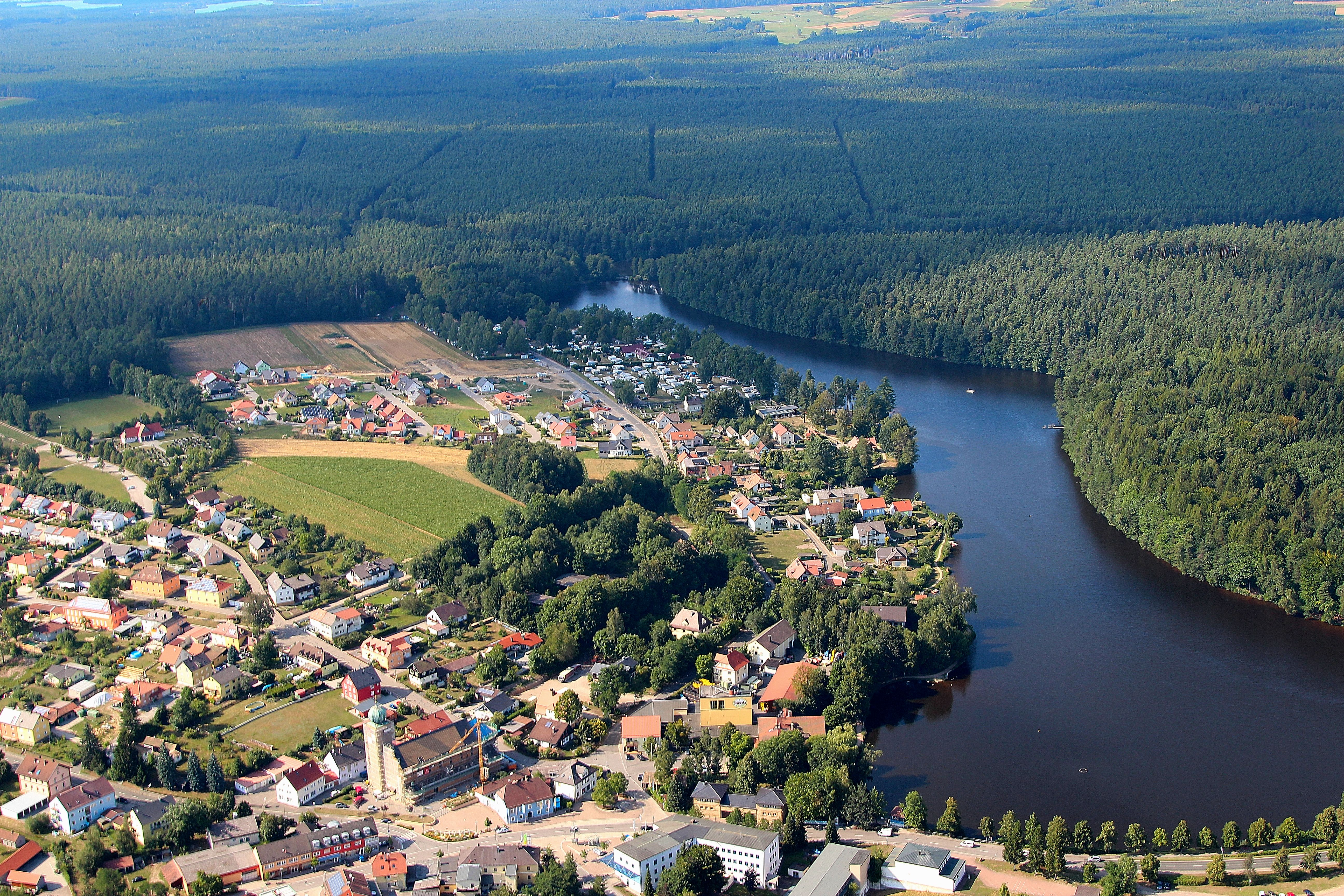 Bodenwöhr mit Hammerweiher und Campingplatz, Landkreis Schwandorf, Oberpfalz, Bayern